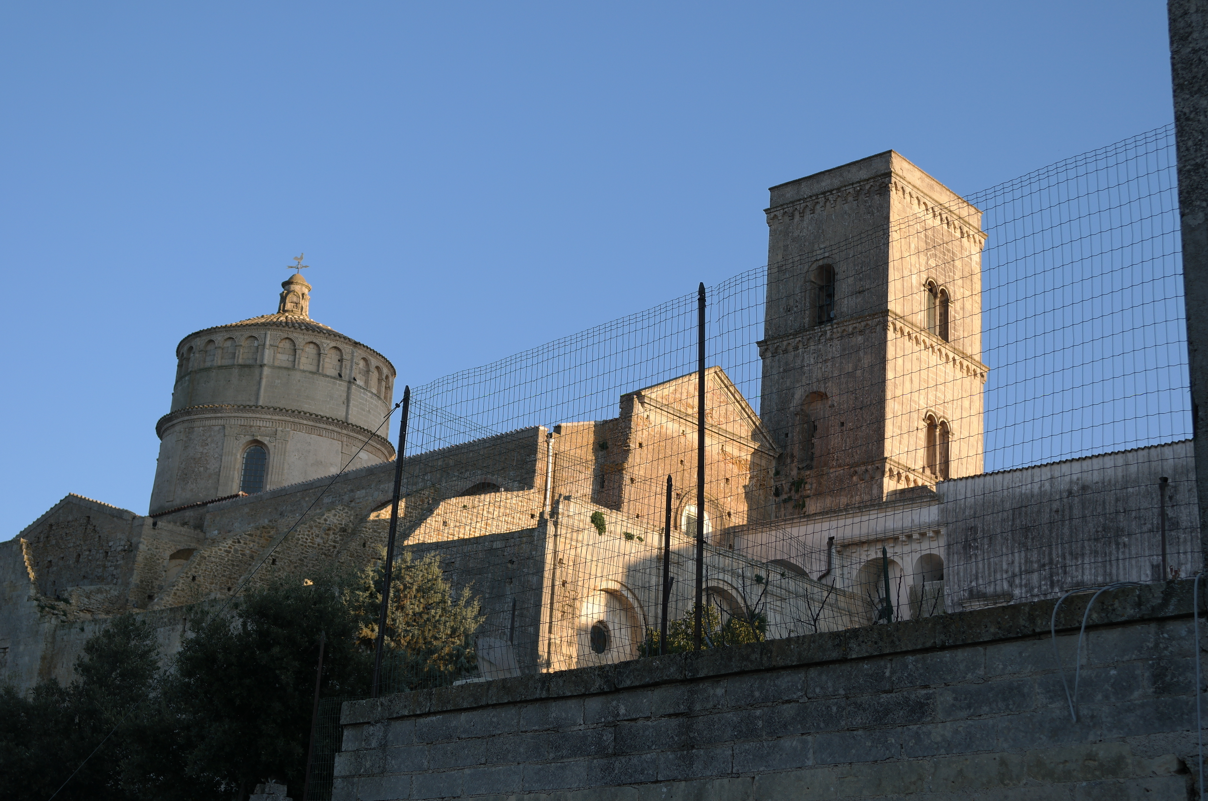 Chiesa dell' Abbazia di san Michele Arcangelo a Montescaglioso